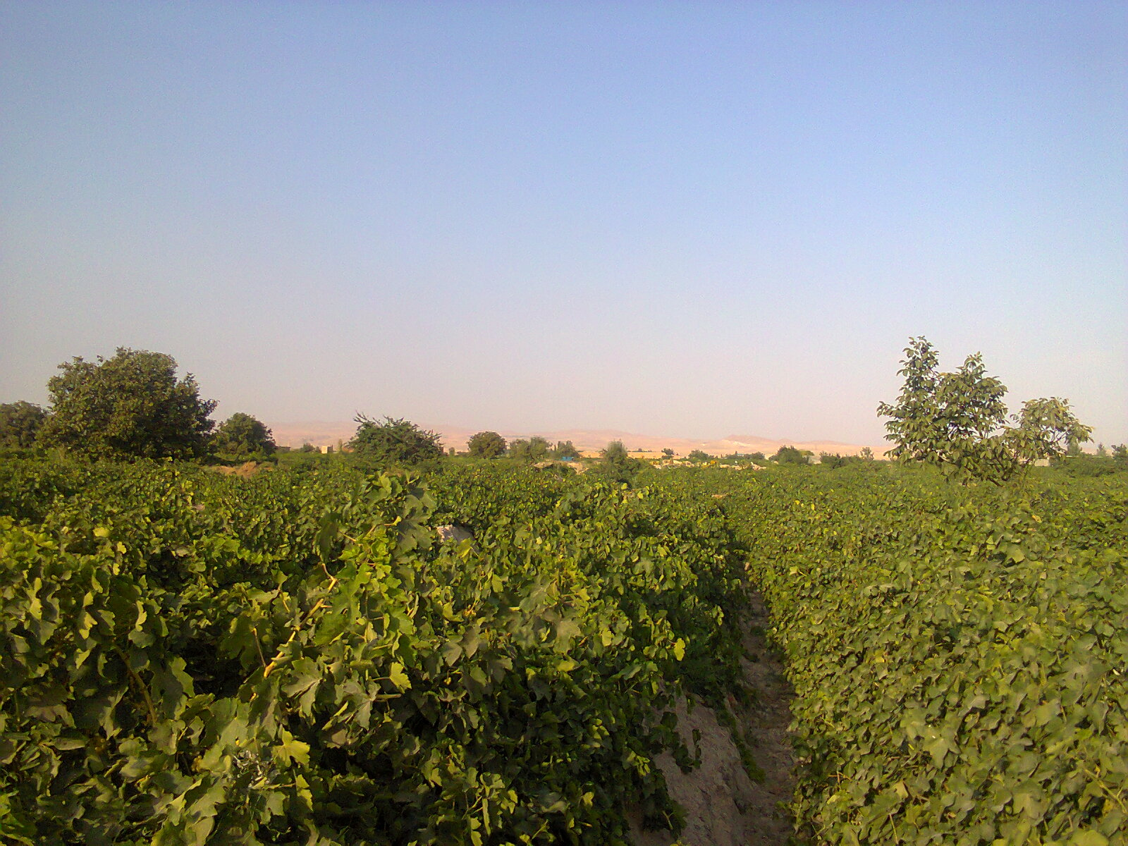 یوزباش کندی قانالاری (Photo by r.amini)